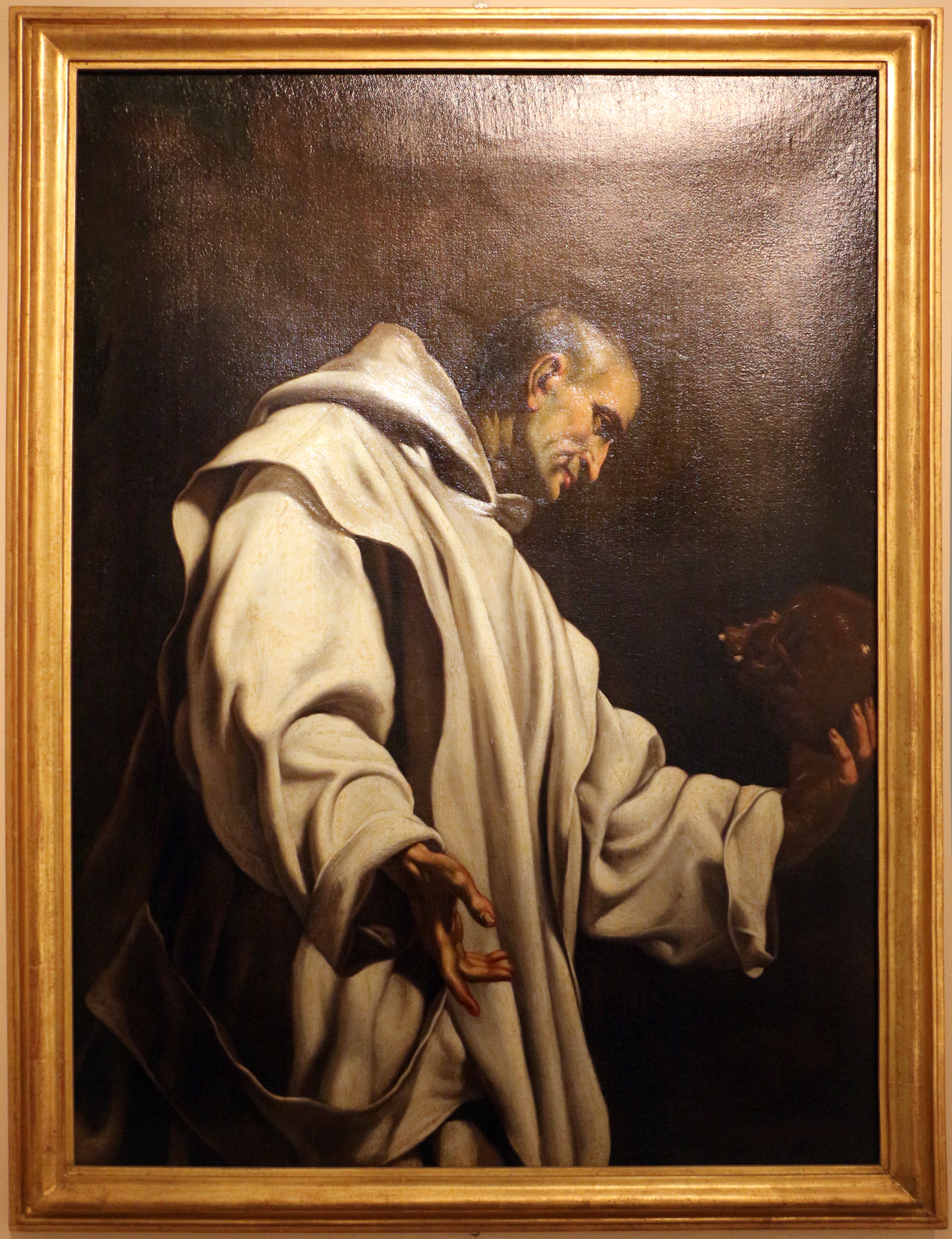 Palazzo dei Diamanti (Ferrara) This is a photo of a monument which is part of cultural heritage of Italy.